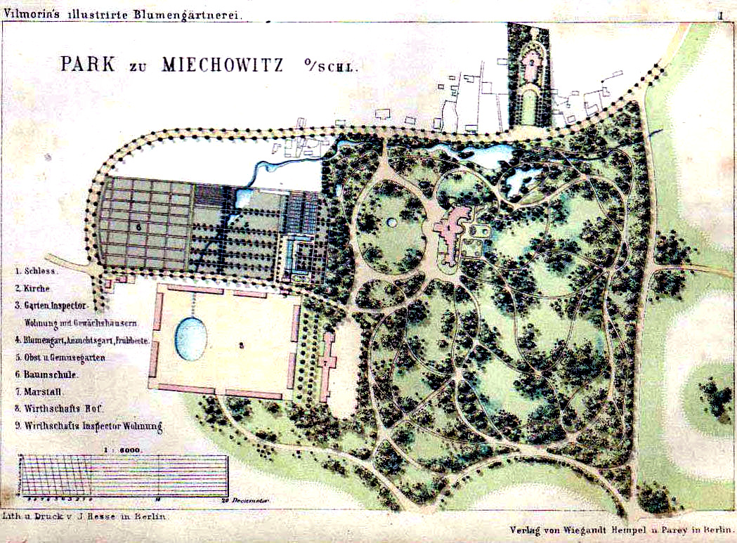 Plan parku przypałacowego w Miechowicach. 1. Schloss 2. Kirche 3. Garten Inspector Wohnung mit Gewächshäusern 4. Blumengart, Anzuchtsgart, Frühbeete 5. Obst u. Gemüsegarten 6. Baumschule 7. Marstall 8. Wirthschafts Hof 9. Wirthschafts Inspector Wohnung